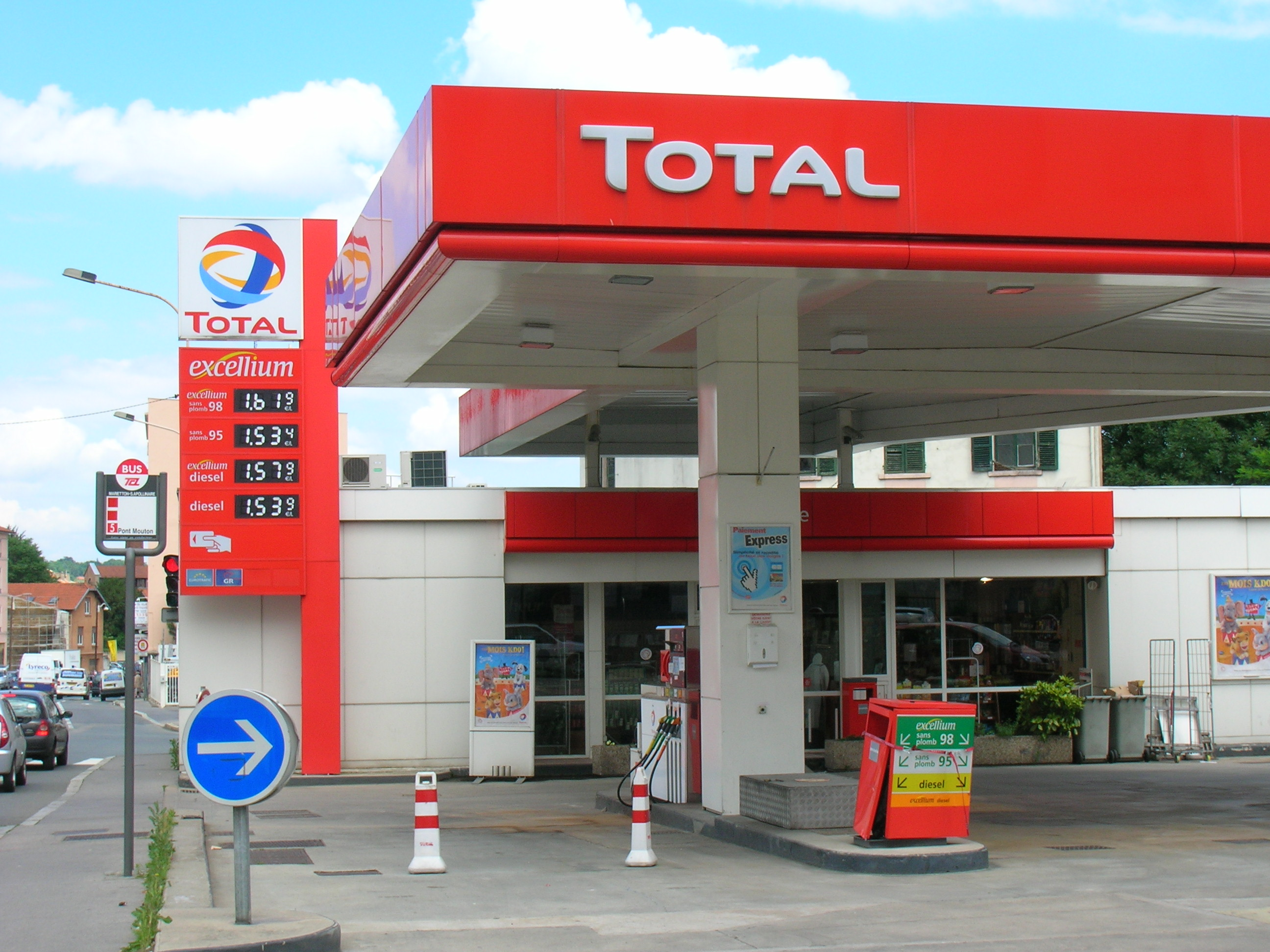 Station essence Total photographiée à Lyon en Juin 2008